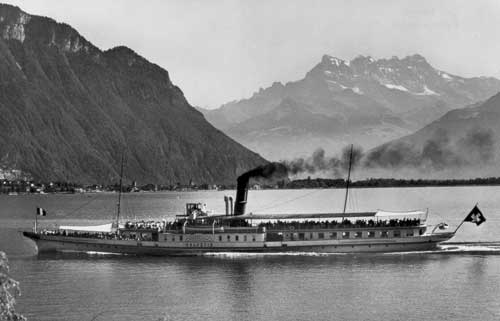 Le bateau "Helvétie" en 1926